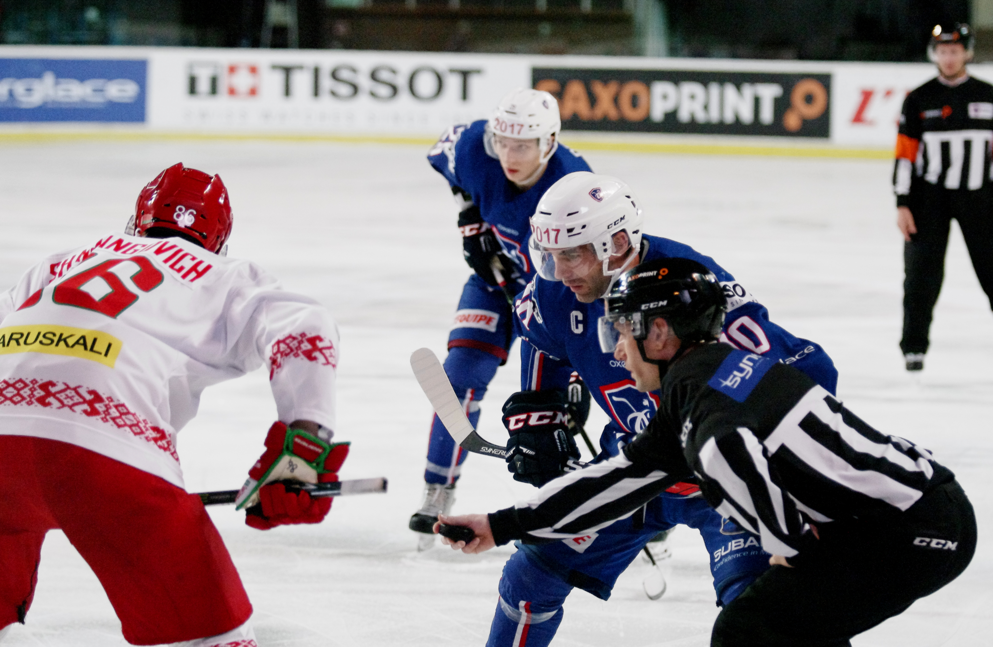 France vs. Biélorussie, 1er mai 2017